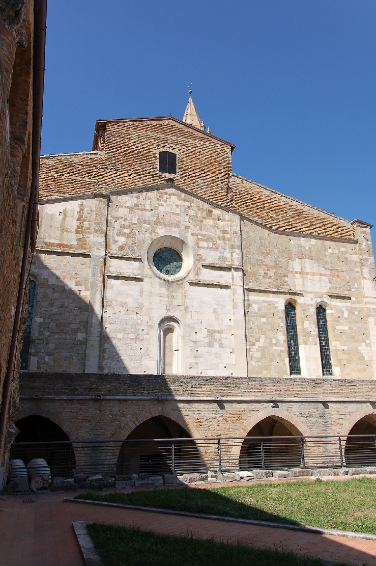 Atri 2011